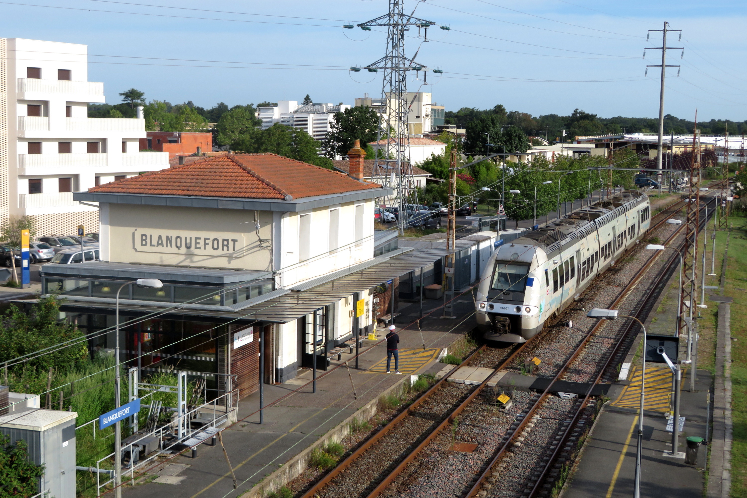 LE B 81601 en livrée Aquitaine assurant le TER n° 866112 (Le Verdon - Bordeau-Saint-Jean) dessert la gare de Blanquefort.